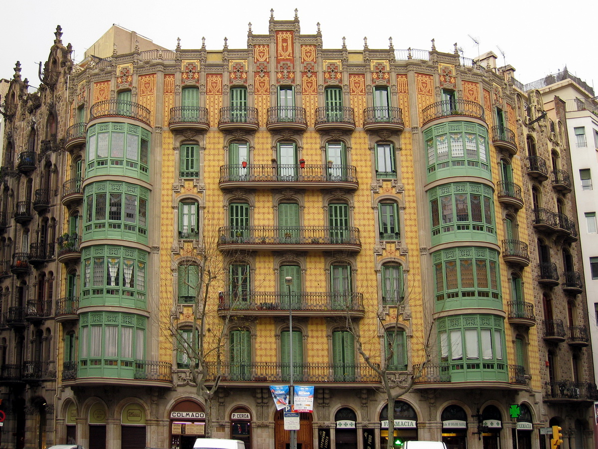 Casa de la Societat Torres Germans, obra modernista de 1905-07 de Jaume Torres i Grau (Barcelona, 1879-1945). Situada a la cruïlla del carrer Paris amb Aribau, a l'Eixample.